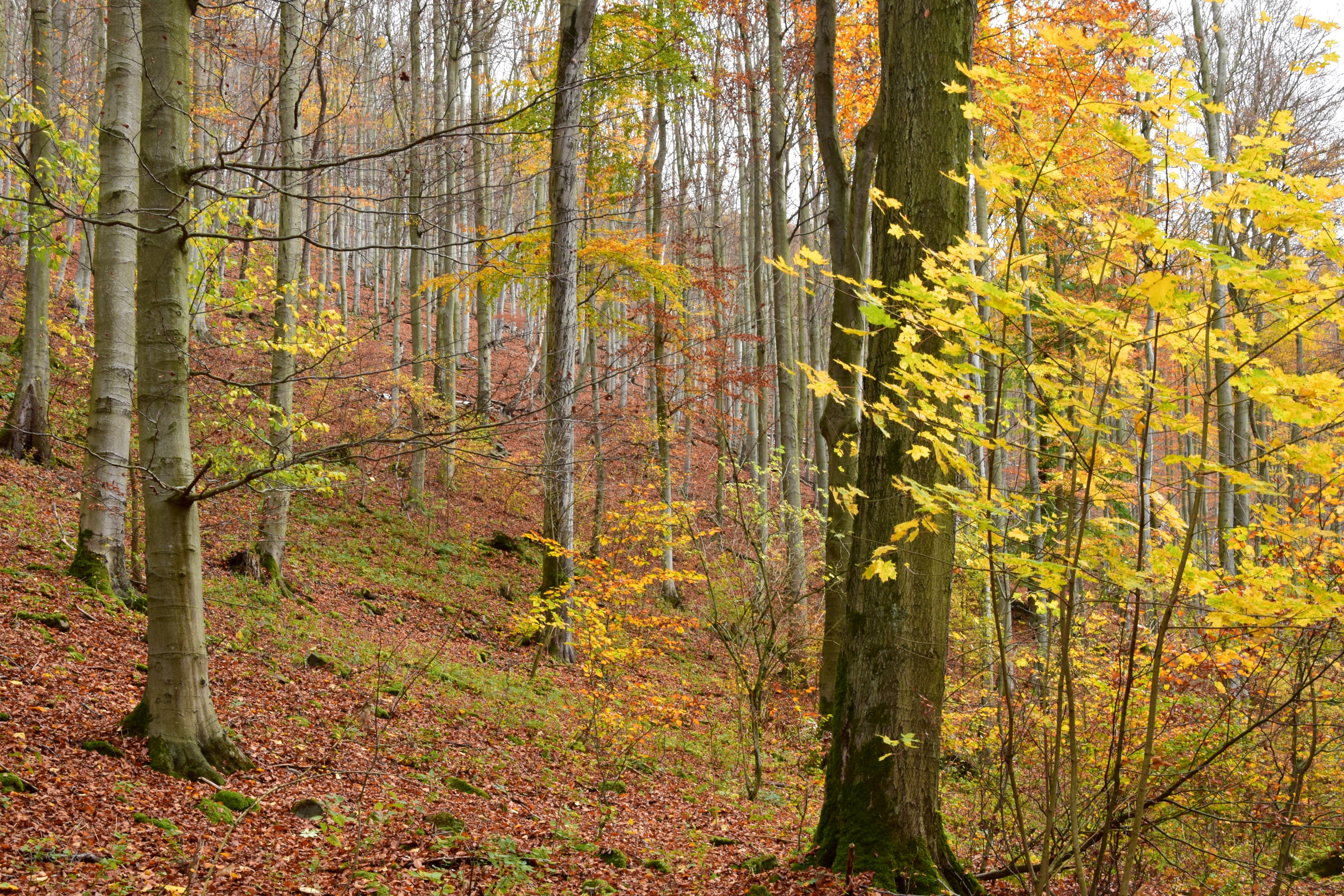 Přírodní památka Drmaly – bučina